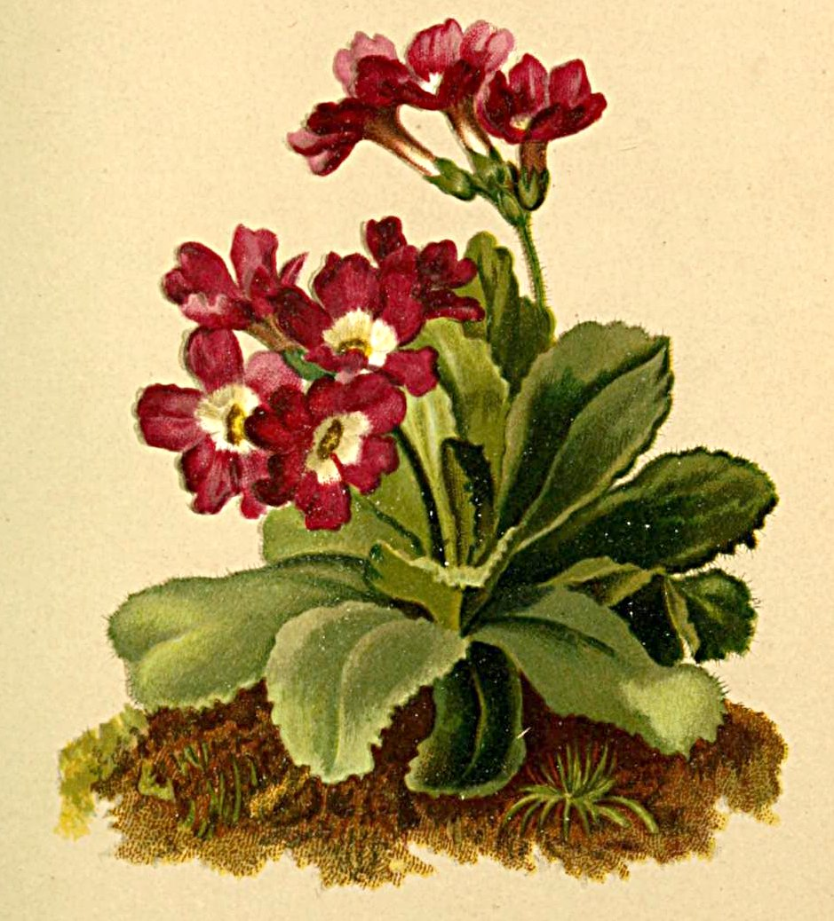 Primula villosa (Androsace villosa)